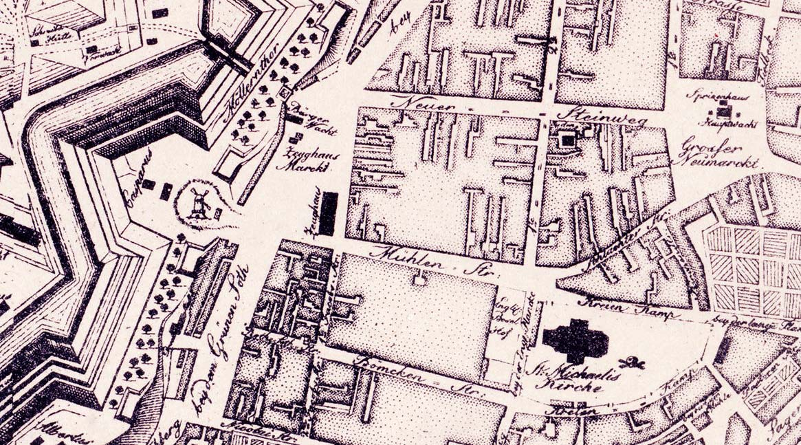 Ausschnitt mit Zeughausmarkt / Hamburg, auf Karte von 1791